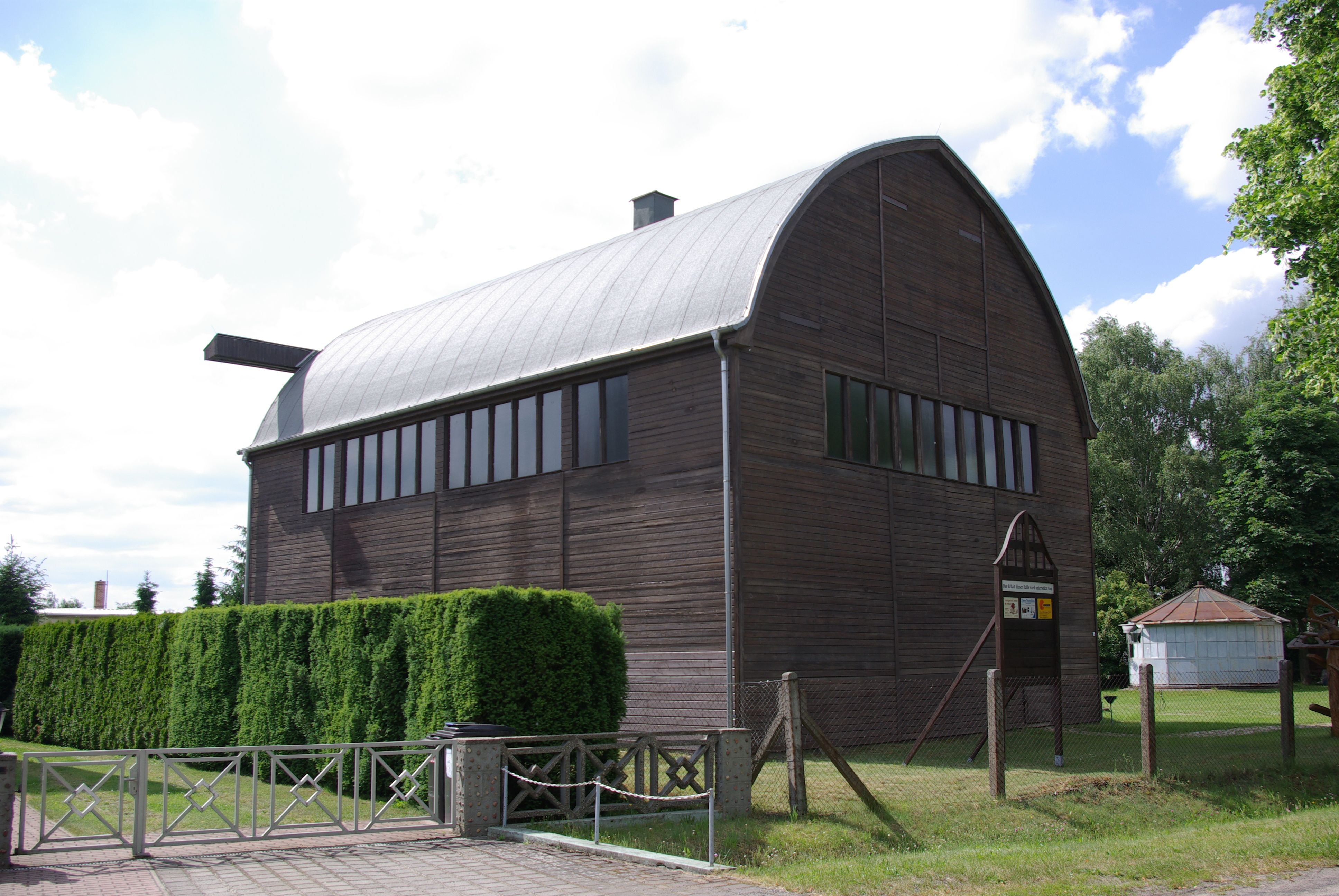 Tauche in Brandenburg. Die Ballonhalle befindet sich im Ortsteil Lindenberg. Neben der Ballonhalle befindet sich eine Windenhaus. Die Ballons wurden von hier zur Wetterbeobachtung benötigt. Das Haus wird vom Wettermuseum betreut. Die Halle und das Windenhaus stehen unter Denkmalschutz.